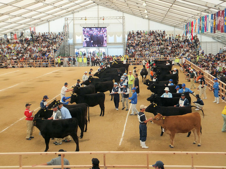 第10回和牛能力共進会の審査風景（ハウステンボス内メイン会場にて）